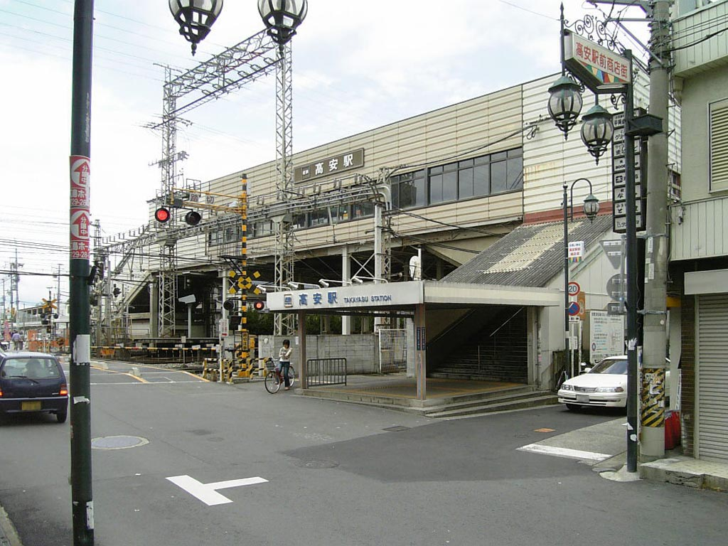 近鉄高安駅（東側） 2006å¹´5æœˆæ’®å½±ã€‚ æ©Ÿæ ï¼šV604SH æ’®å½±è€…ï¼šKansai explorer æ’®å½±å¾Œãƒ¬ã‚¿ãƒƒãƒ